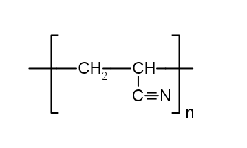 Auteur Pulko Citron